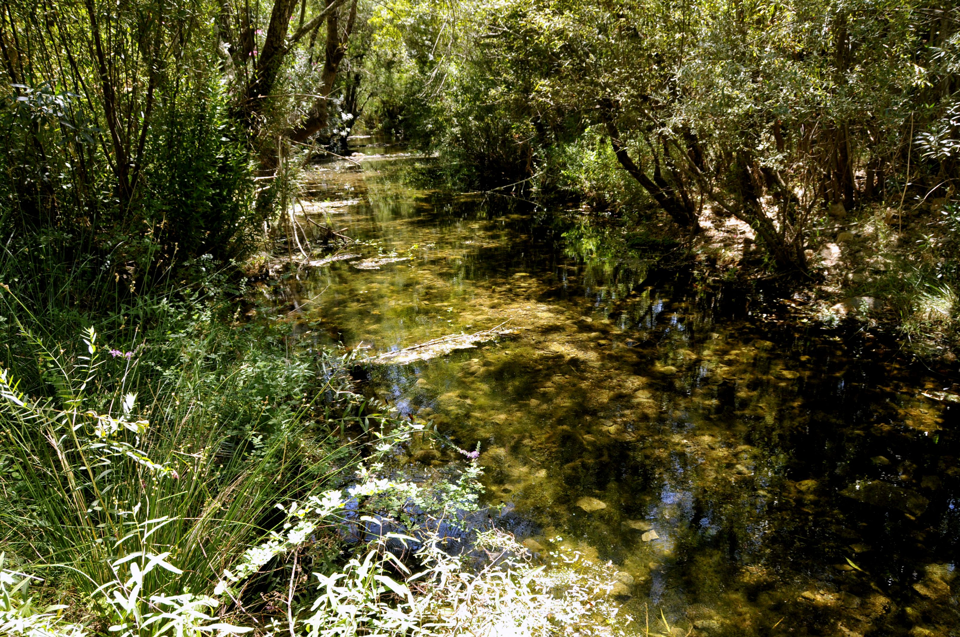 Querenca: Bachlauf nahe der Fonte Benemola